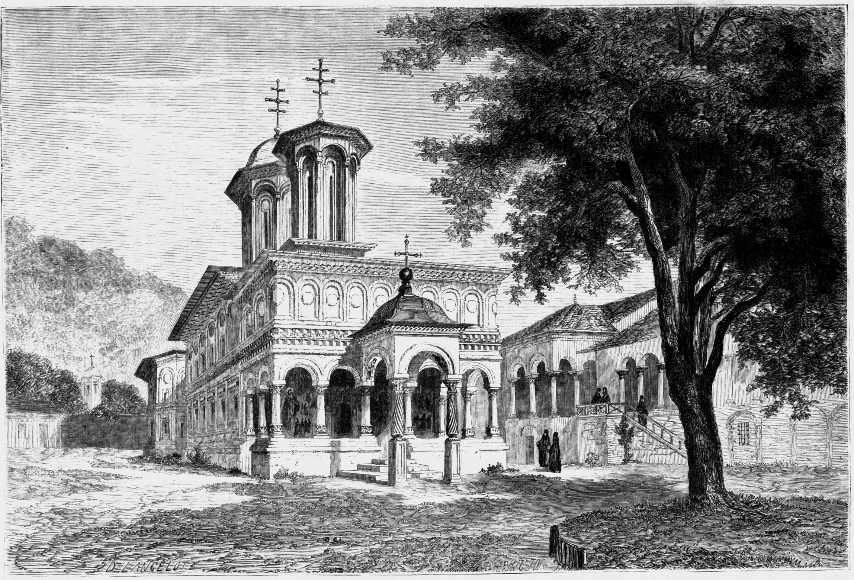 L'église du monastère de Horezu (Valachie, Roumanie)